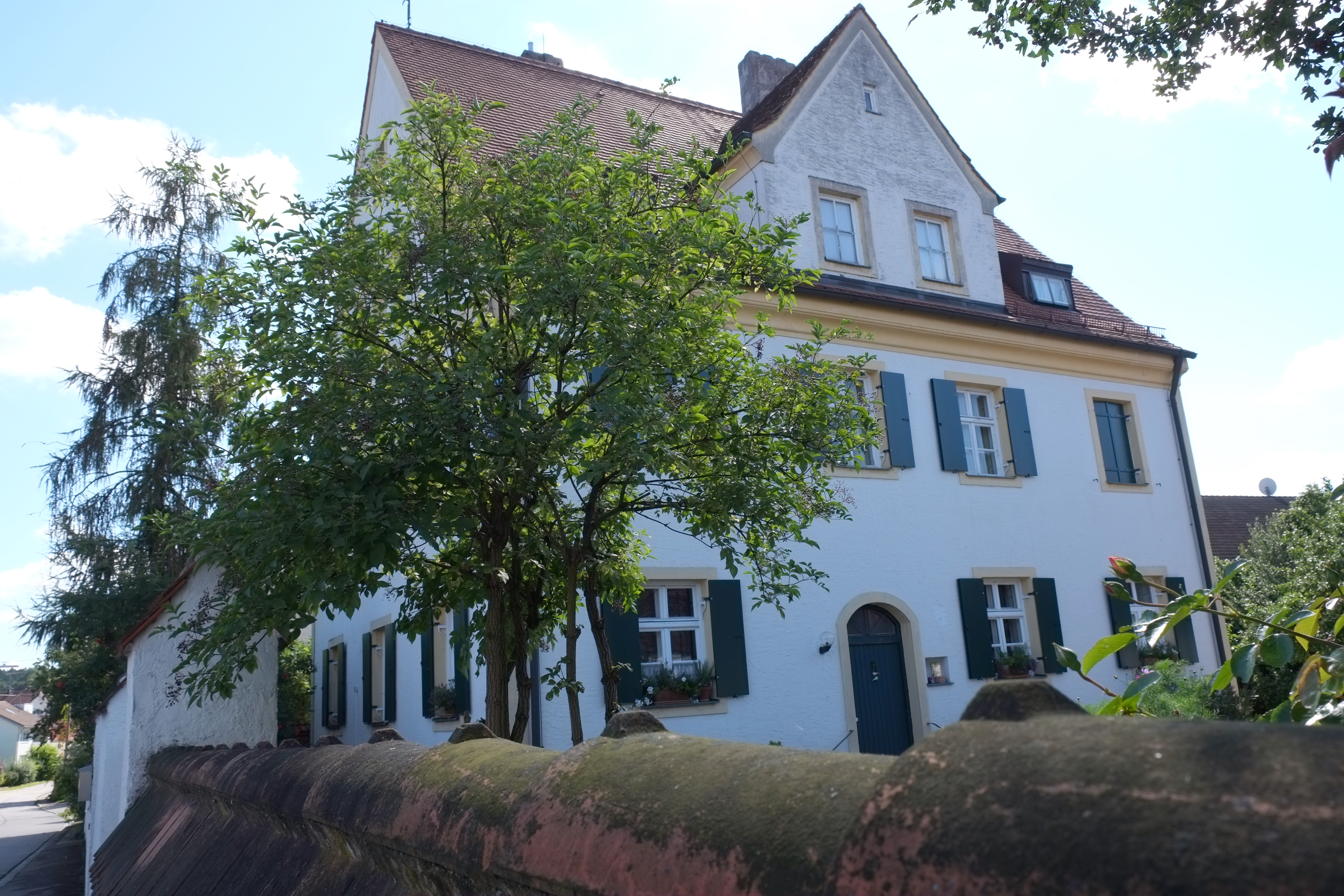 Pfarrhaus in Gallenbach, einem Stadtteil von Aichach im Landkreis Aichach-Friedberg (Bayern, Deutschland)